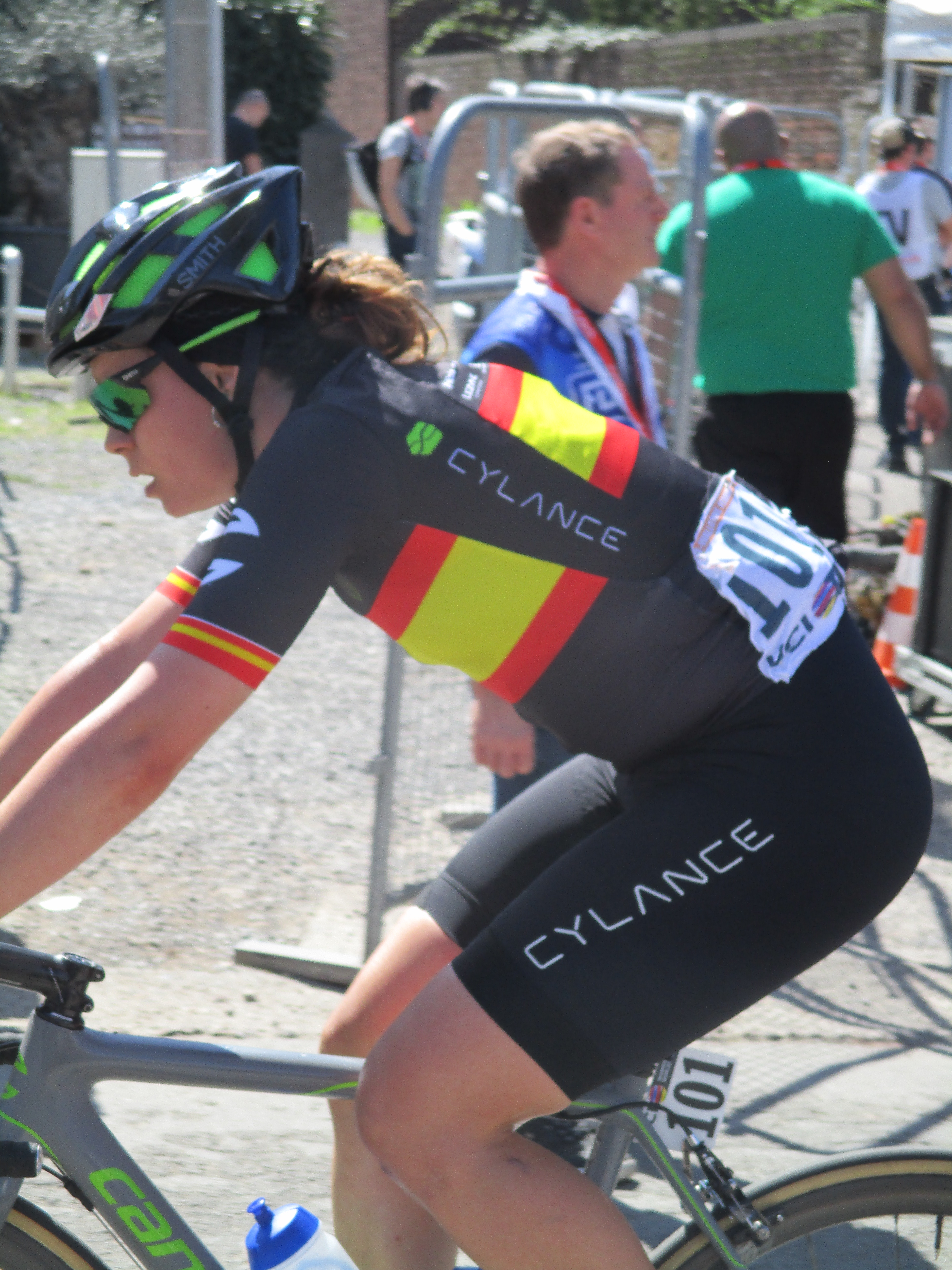 Finish van de Waalse Pijl 2018 op de Mur van Huy.